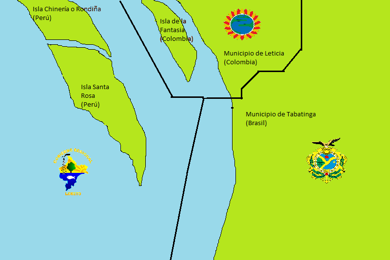 Geopolitica de los territorios de respectivos paises